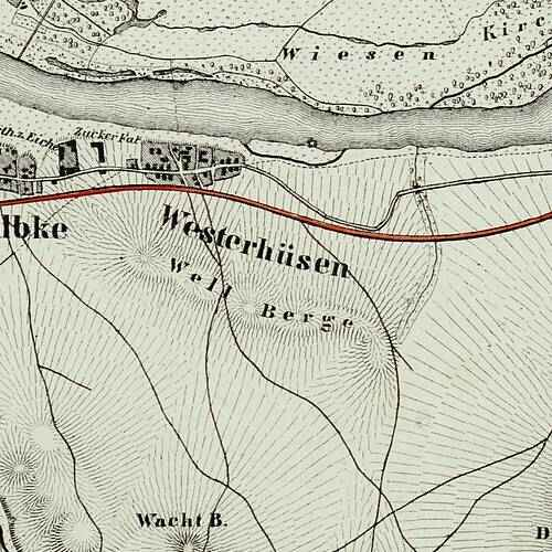 Wellenberge westlich von Westerhüsen auf Karte von 1841, Karte nich eingenordet, oben ist Osten, links Norden